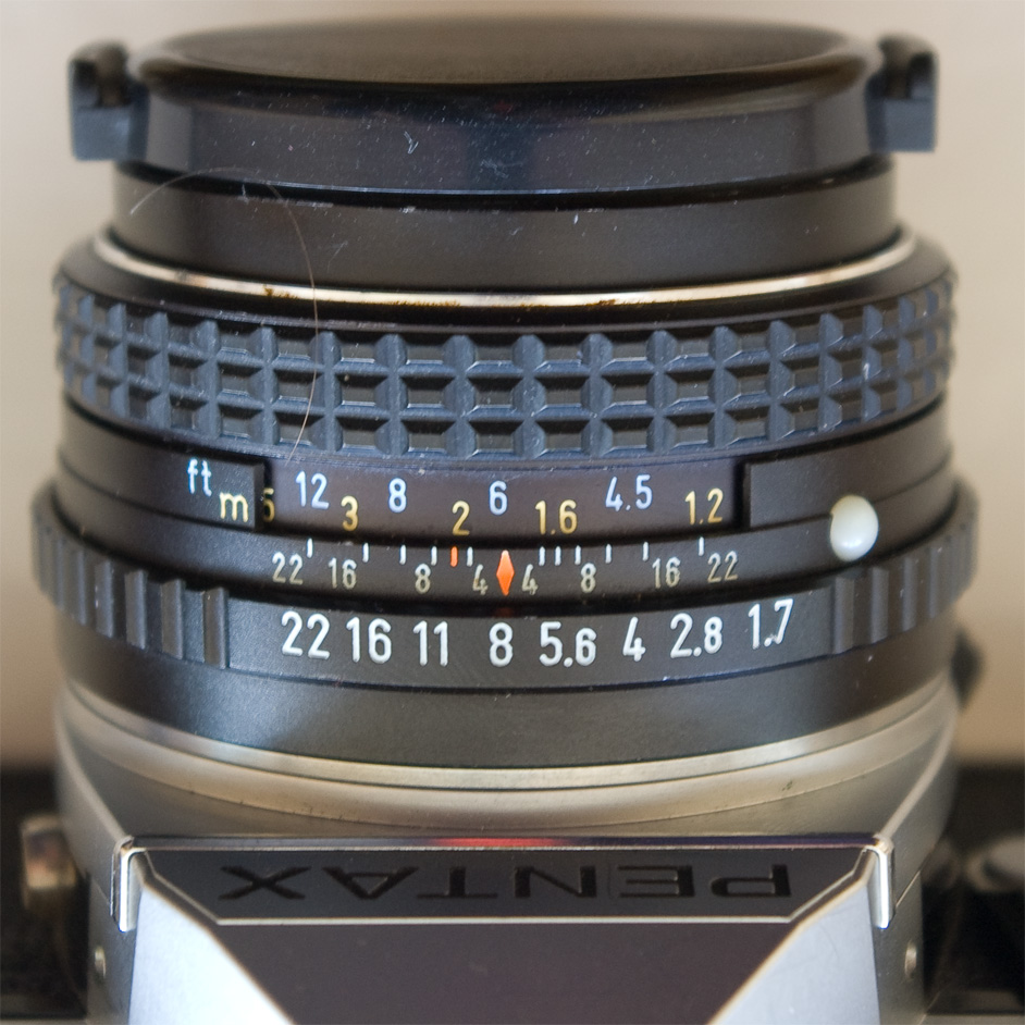 Шкала диафрагм и наводки на резкость объектива SMC Pentax 50 мм f/1,7